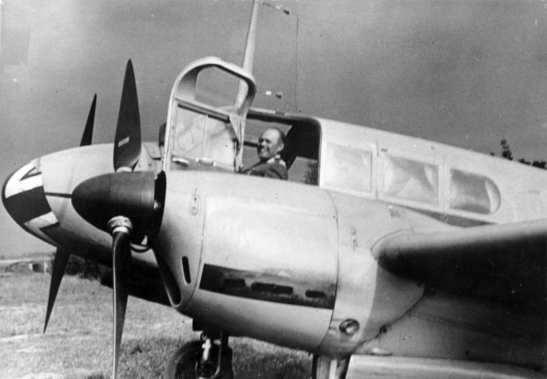 Generalfeldmarschall Kesselring am Steuer seines Flugzeuges.